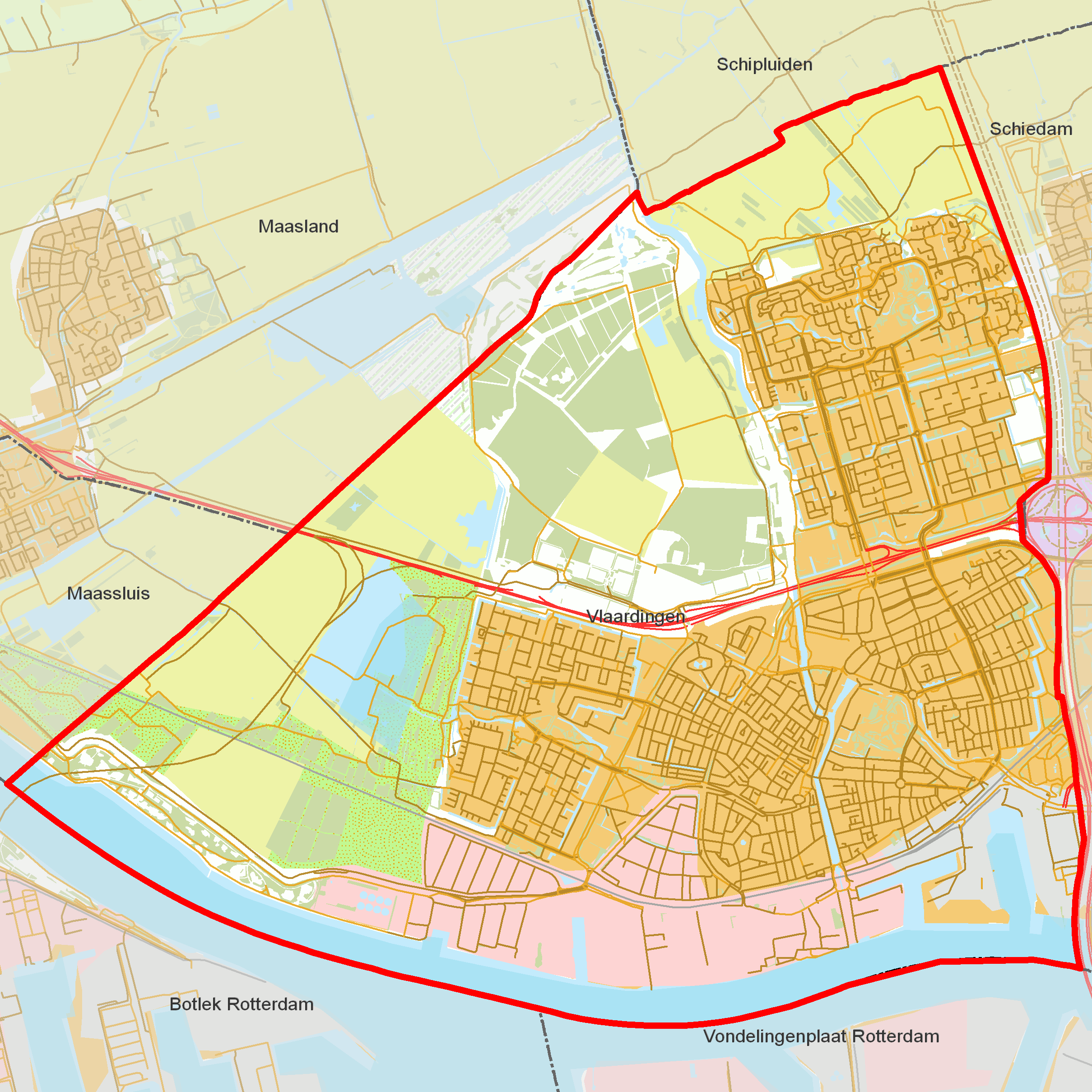 BAG woonplaatsen - Gemeente Vlaardingen.png